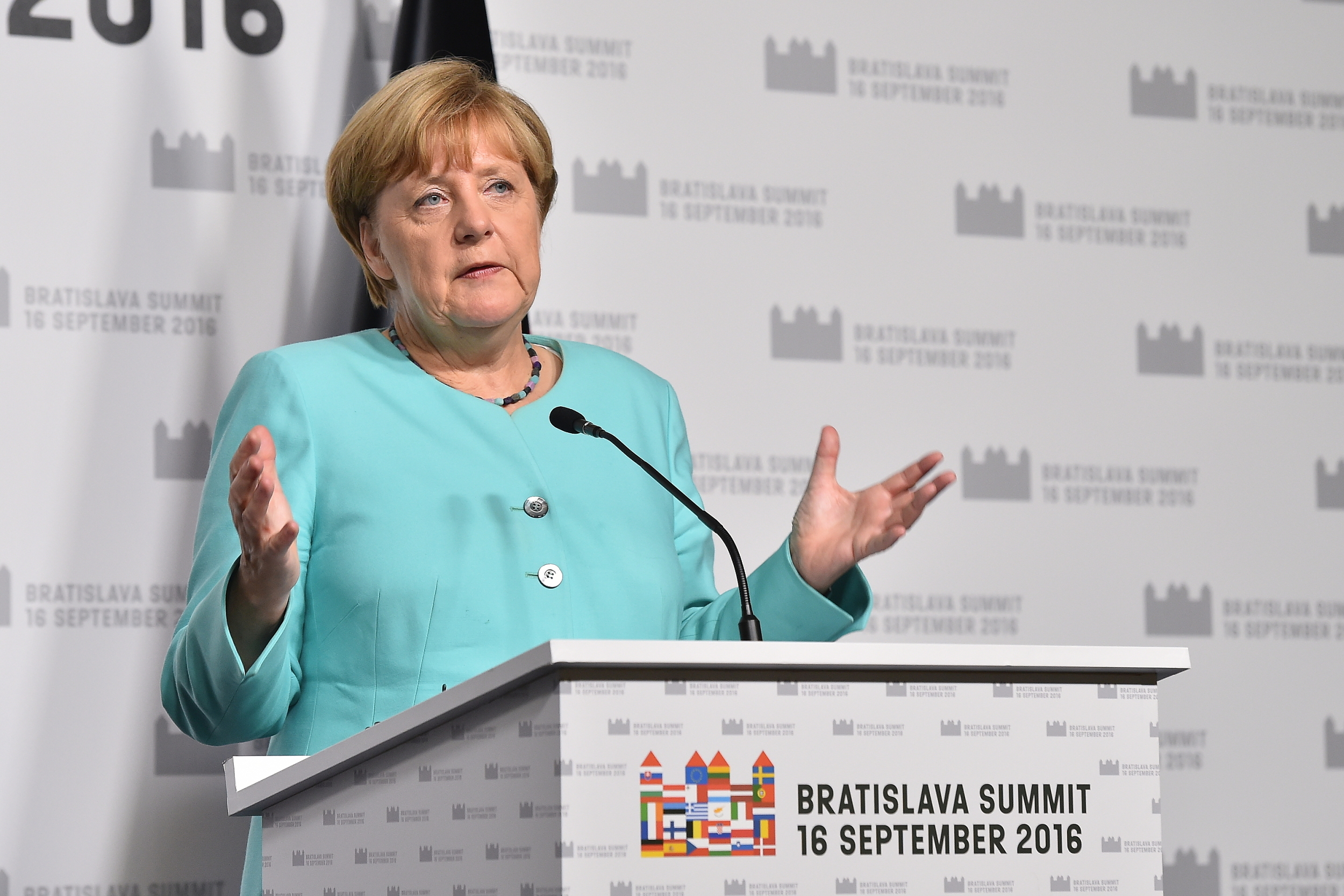 PRESS CONFERENCE MERKEL-HOLLANDE - BRATISLAVA SUMMIT 16. SEPTEMBER 2016 Photo Rastislav Polak